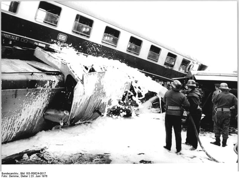 ADN-ZB Demme 23.6.1976 Bez. Erfurt: Zugentgleisung in der Nähe Eisenachs-In der Nähe des Bahnhofs Eisenachs entgleisten am 23.6.1976 aus bisher noch nicht geklärter Ursache vier Reisezugwagen des D 354 Berlin-Friedrichstraße - Paris. Ein Wagen stürzte um und kollidierte dabei mit einer Lokomotive, die auf dem Nebengleis leere Personenwagen rangierte. Fünf Fahrgäste und der Lokführer wurden schwer und 20 weitere Personen leicht verletzt. Die Verletzten erhalten im Kreiskrankenhaus der Stadt Eisenach alle notwendige ärztliche Fürsorge.